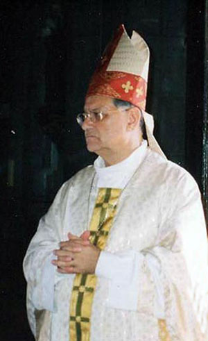 Arcivescovo Fouad Twal